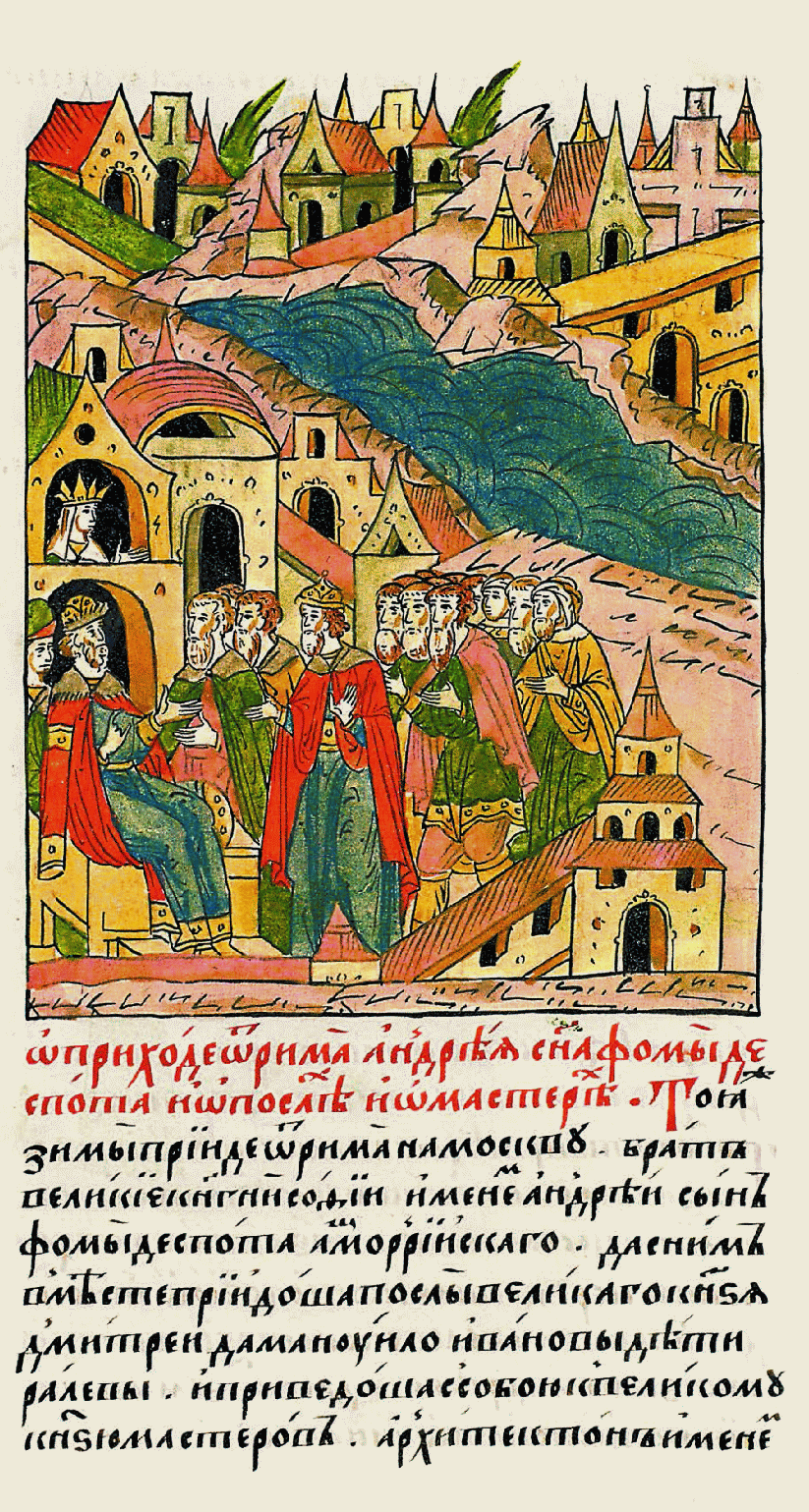 О прибытии из Рима Андрея, сына деспо- та Фомы, и о послах, и о мастерах. В ту же зиму пришел из Рима в Москву брат вели- кой княгини Софьи, именем Андрей, сын Фомы, деспота Ам- морийского; и с ним вместе пришли послы великого князя — Дмитрий и Мануил, дети Ивана Ралева, и привели с собой к великому князю мастеров: архитектона именем [Петр Антоний и его ученика Замантоя, стенных и палатных мастеров, и пушеч- ного мастера Якова с женой, и серебряных дел мастера Христо- фора с двумя ученика- ми из Рима, и немца Олберда из Любека, и Карла с учеником из Милана, и Петра Райка, грека из Ве- неции, и капеллана белых монахов ордена августинцев Ивана Списателя, органного игреца, и лекаря жи- довина мистра Леона из Венеции.]